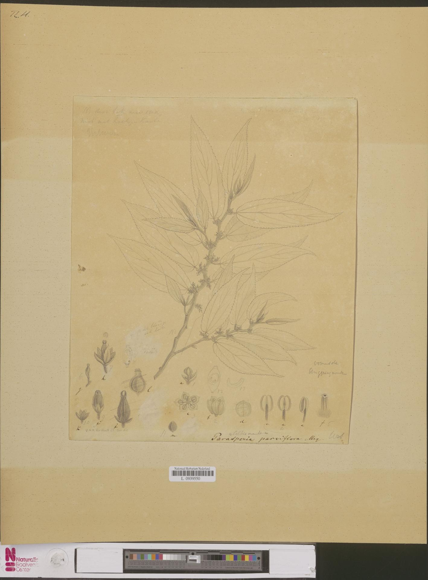 Parasponia parviflora